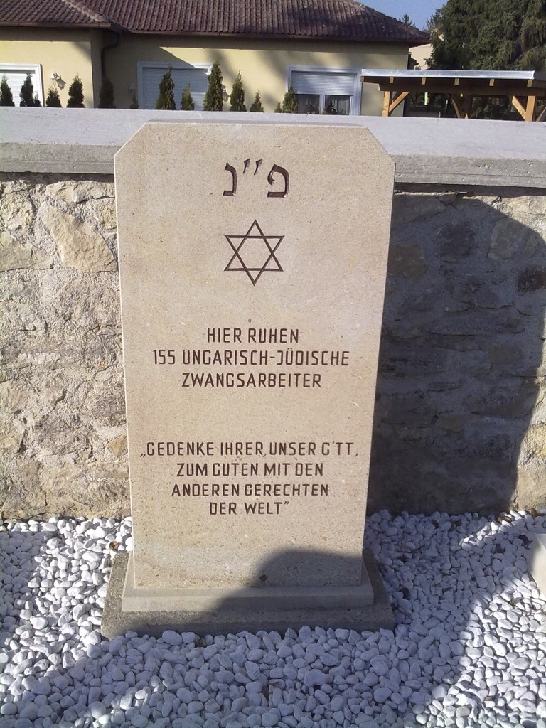 Neugestaltete Grab- und Gedenkstätte der Stadtgemeinde Bruck an der Leitha für die 155 jüdischen Zwangsarbeiter.